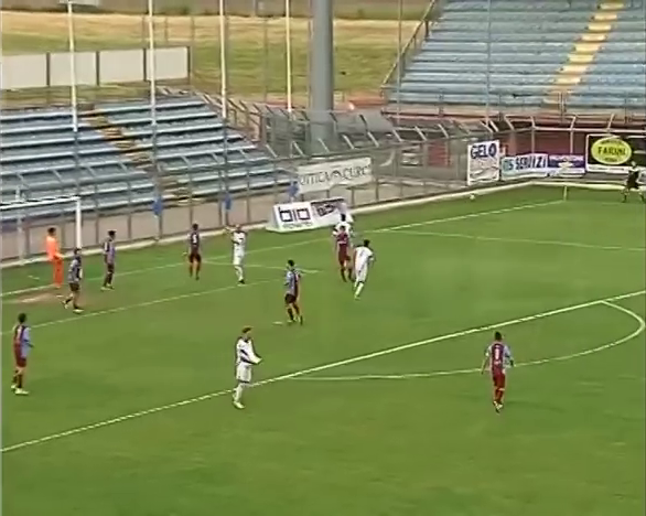 Partita di calcio Rieti-L'Aquila, terminata 4-1, del campionato di serie D disputata il 21 maggio 2017 allo stadio Centro d'Italia-Manlio Scopigno di Rieti